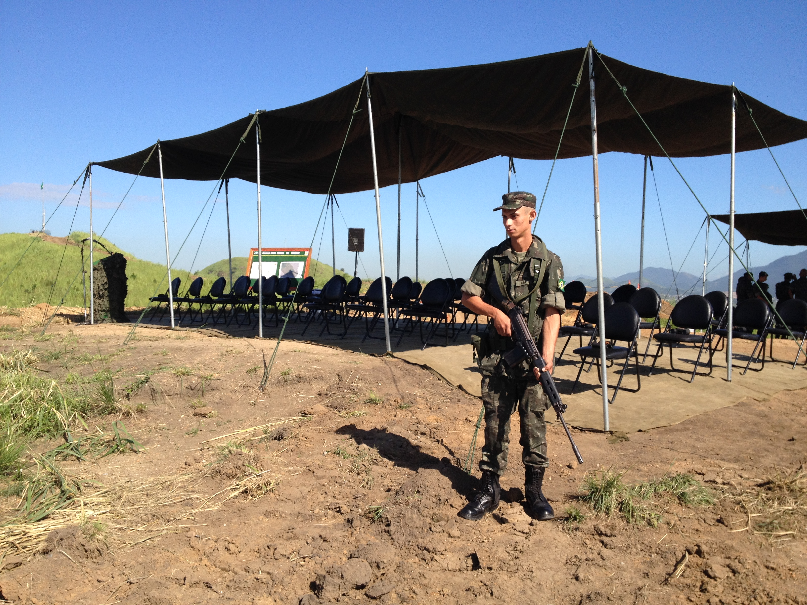 A Companhia de Comando da 1ª Divisão de Exército mobiliou, no dia 29 de abril, um posto de observação nas alturas de Morro do Jacques, região do Campo de Instrução de Gericinó. O referido PObs apoiou reconhecimento em proveito da Assessoria Especial para os Jogos Olímpicos e Paraolímpicos Rio-2016 (AJO).